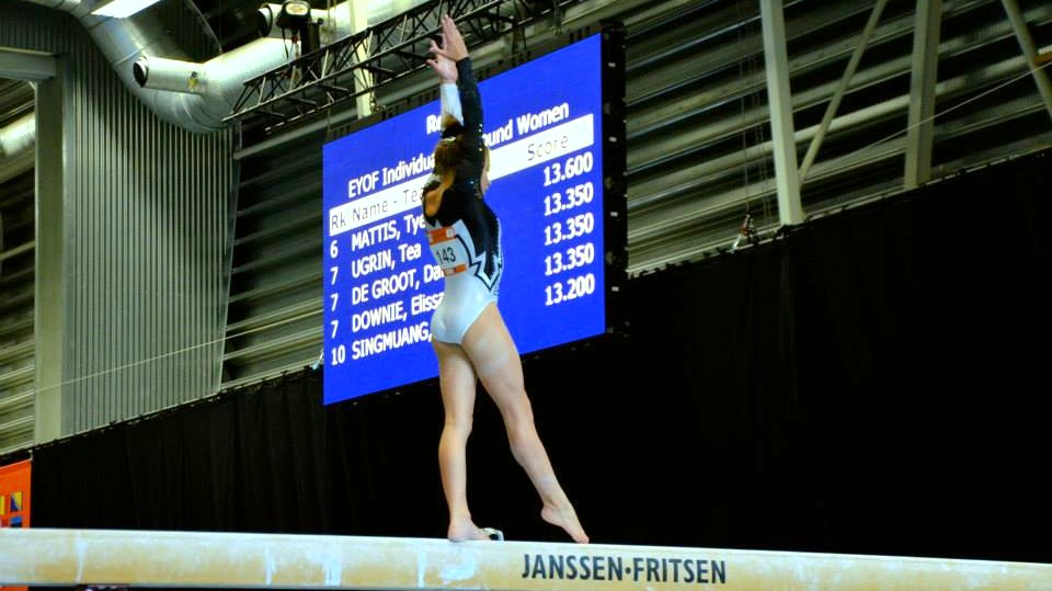 Lara Mori agli EYOF 2013